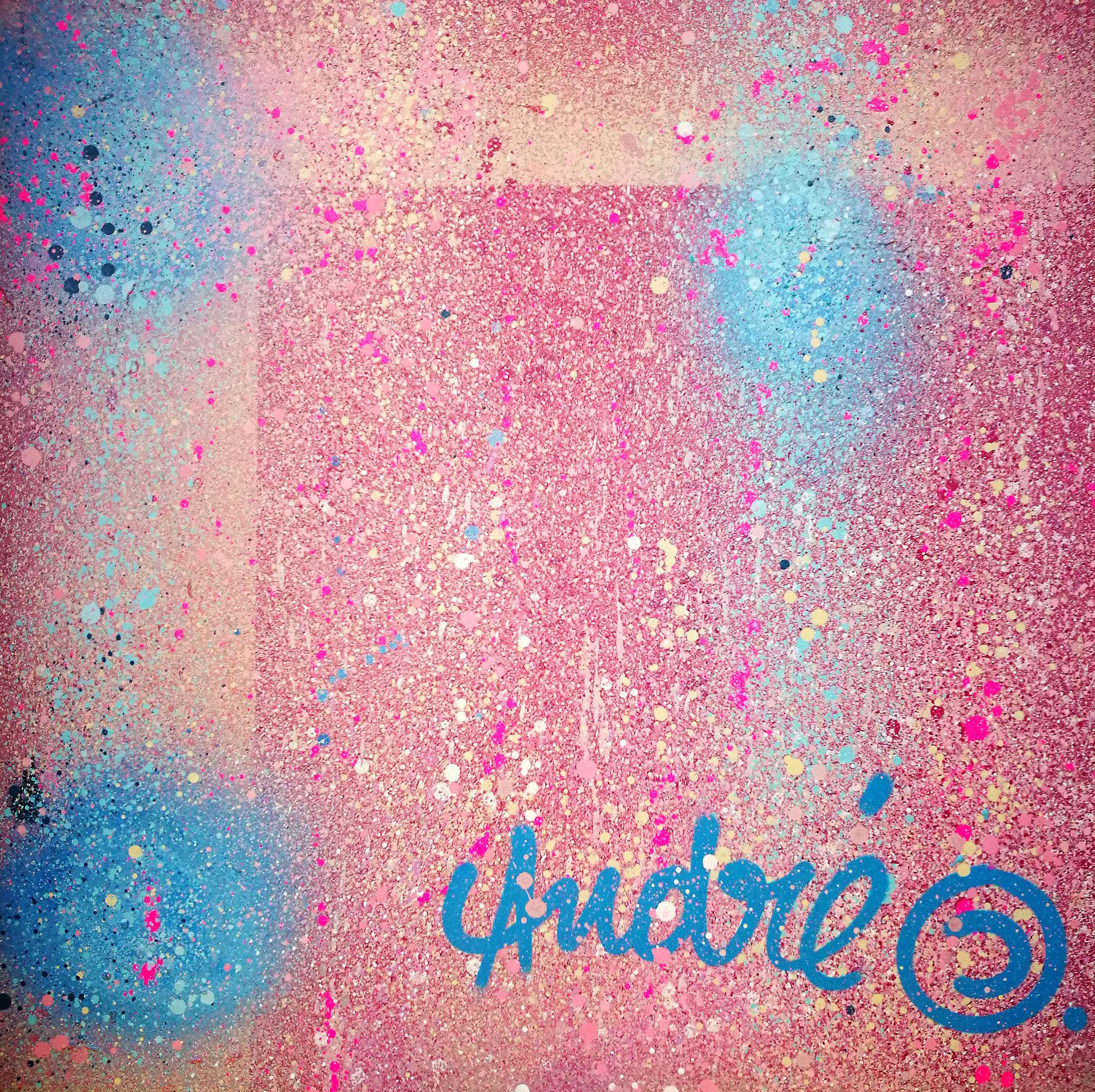 100cmX100cm